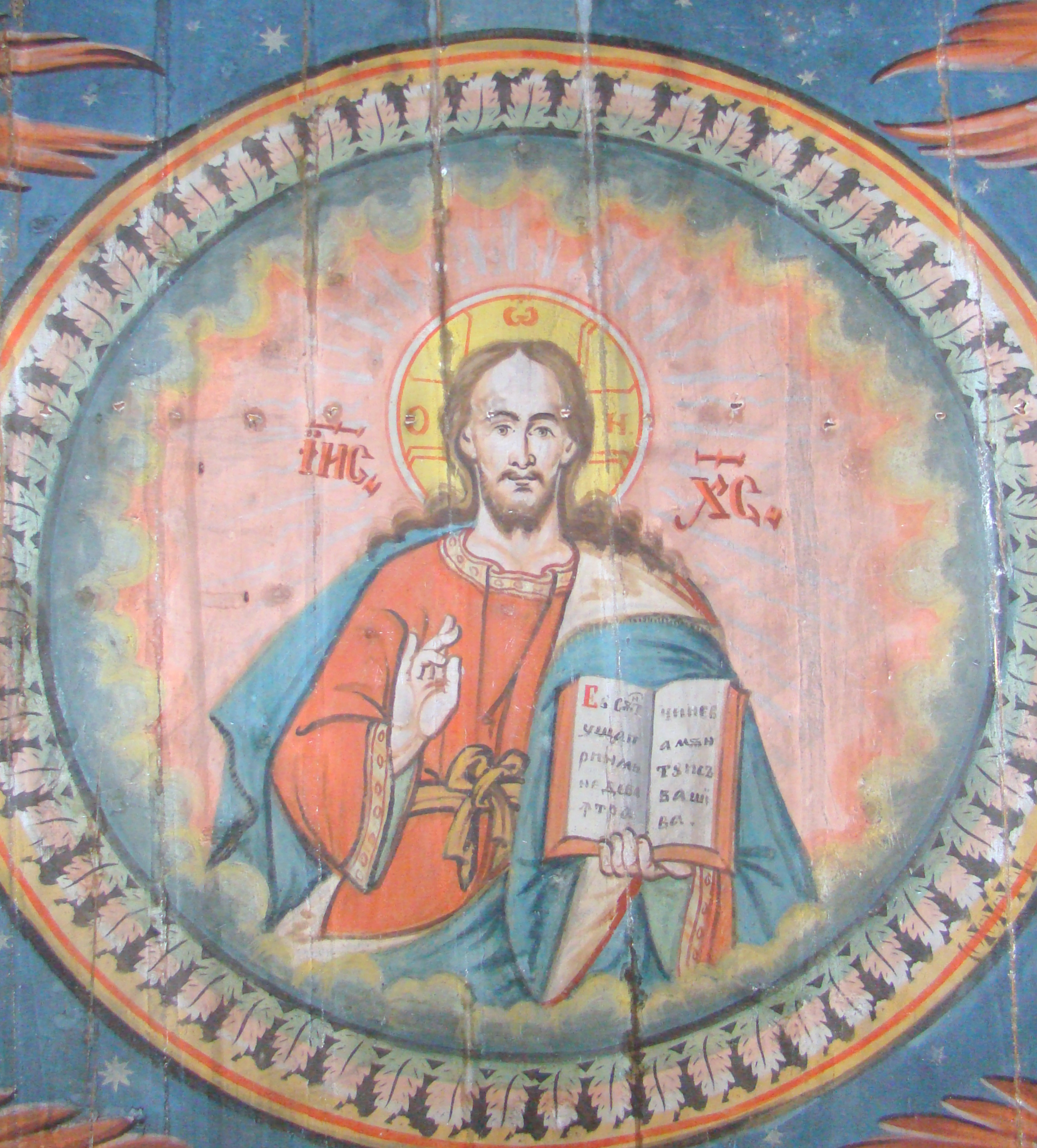 Biserica de lemn „Buna Vestire”, Birtin, Hunedoara